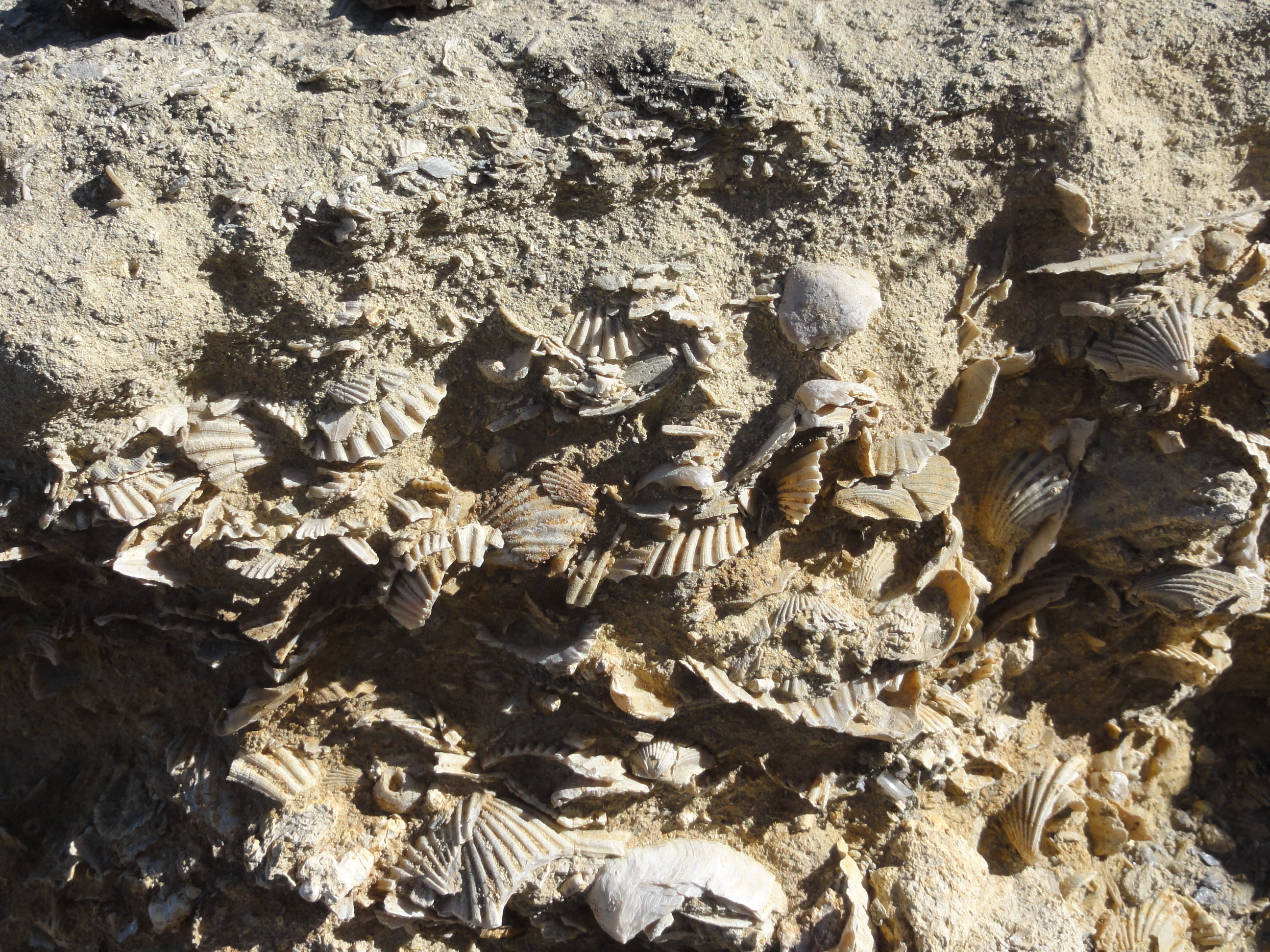 Playa fósil de unos 7 millones de años de edad, datada gracias a la abundancia de fósiles marinos This is a photography of a Special Area of Conservation in Spain with the ID: ES6110002. Natura2000 entry, EEA entry